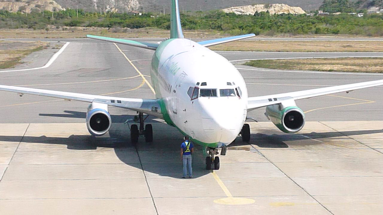 Prepandose para el Despegue